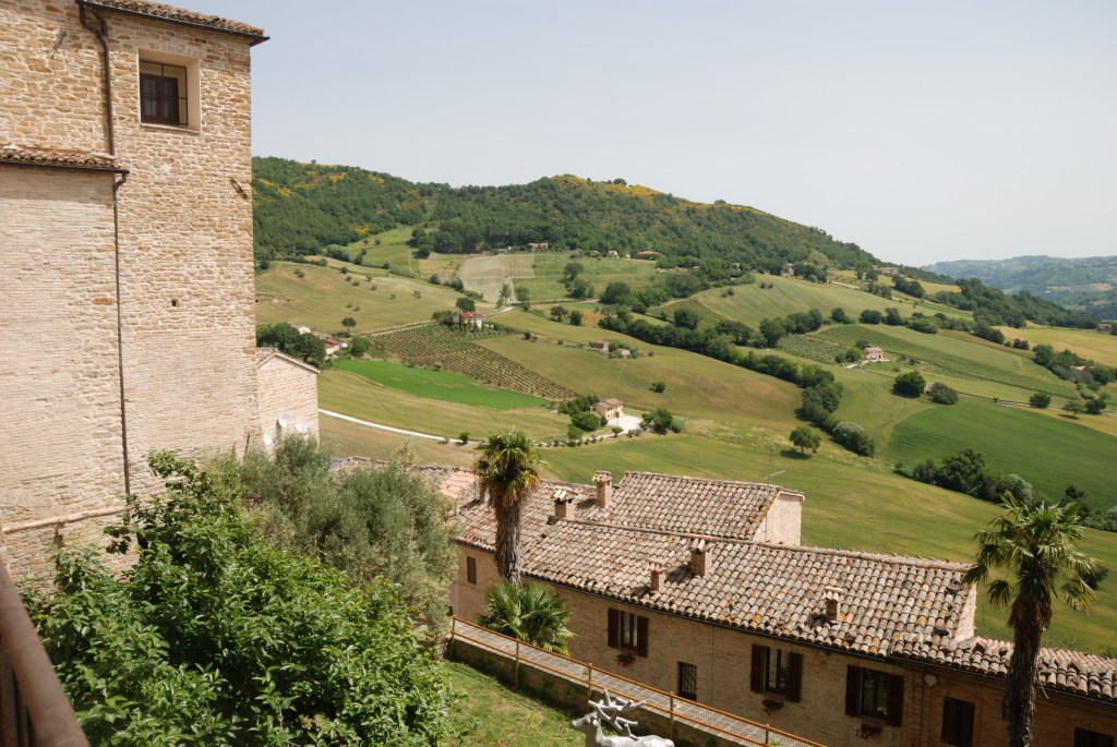 Serra San Quirico, provincia di Ancona, Italia.